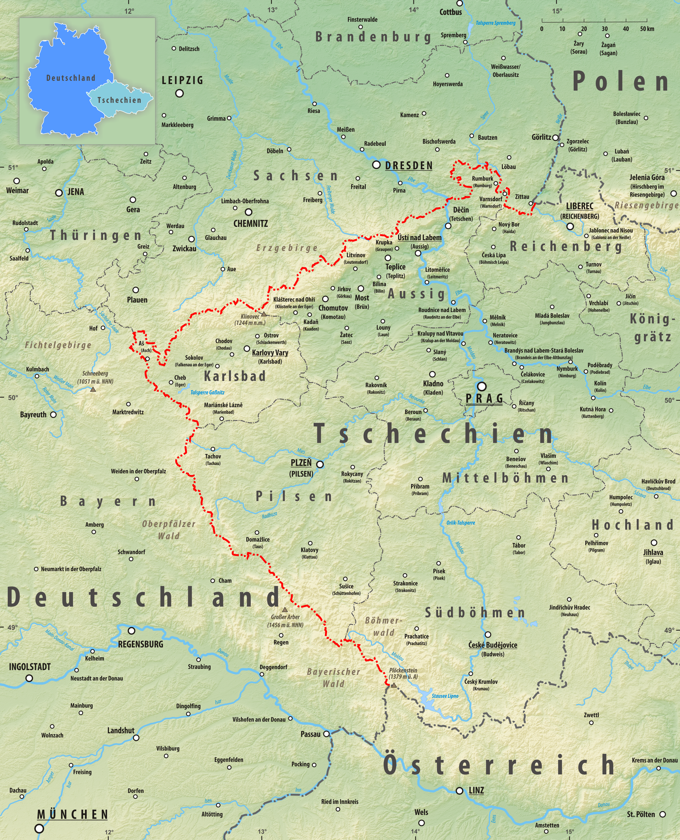 Reliefkarte des Grenzverlaufes zwischen Deutschland und Tschechien Topographischer Hintergrund: NASA Shuttle Radar Topography Mission (public domain). SRTM3 v.2.